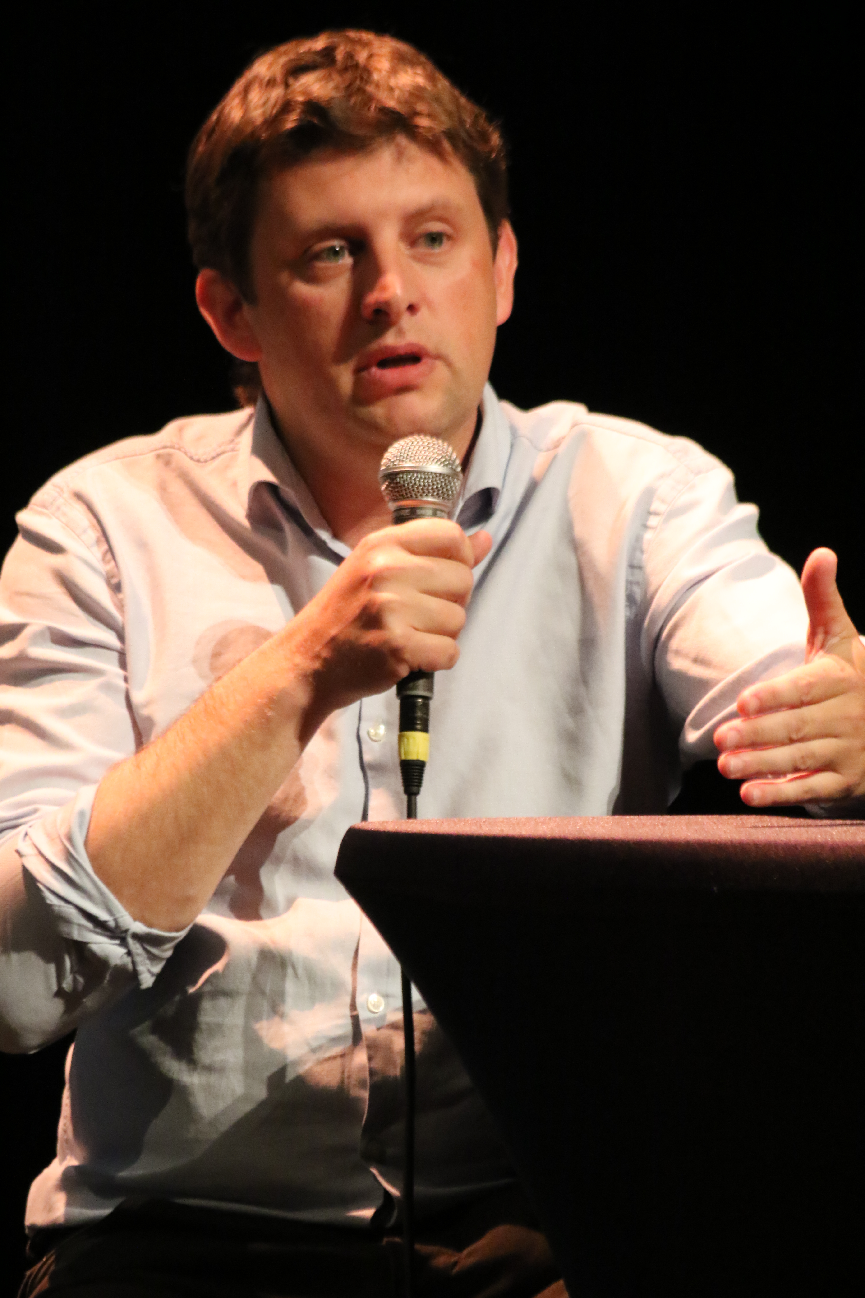 Foto genomen tijdens het debat tussen John Crombez en Bruno Tobback van 20 mei 2015 in de Vooruit Gent